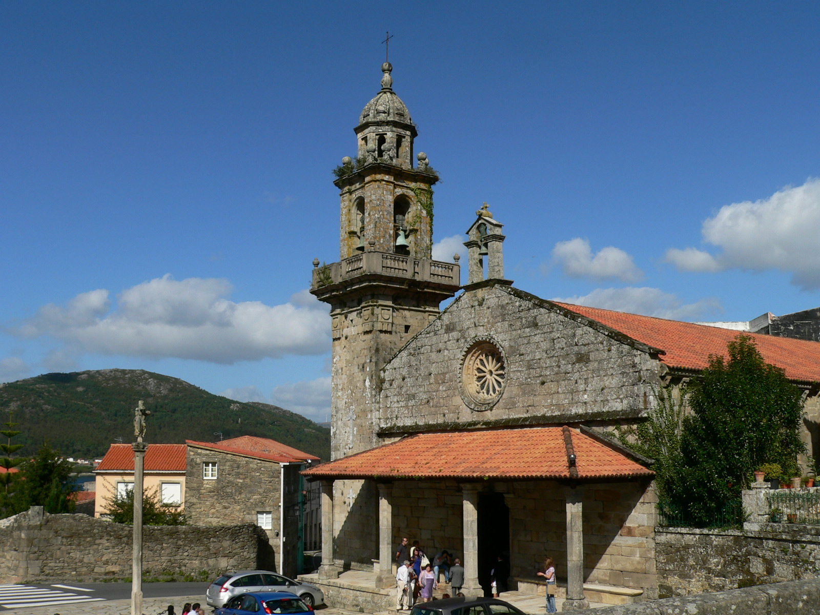 San Pedro de Muros